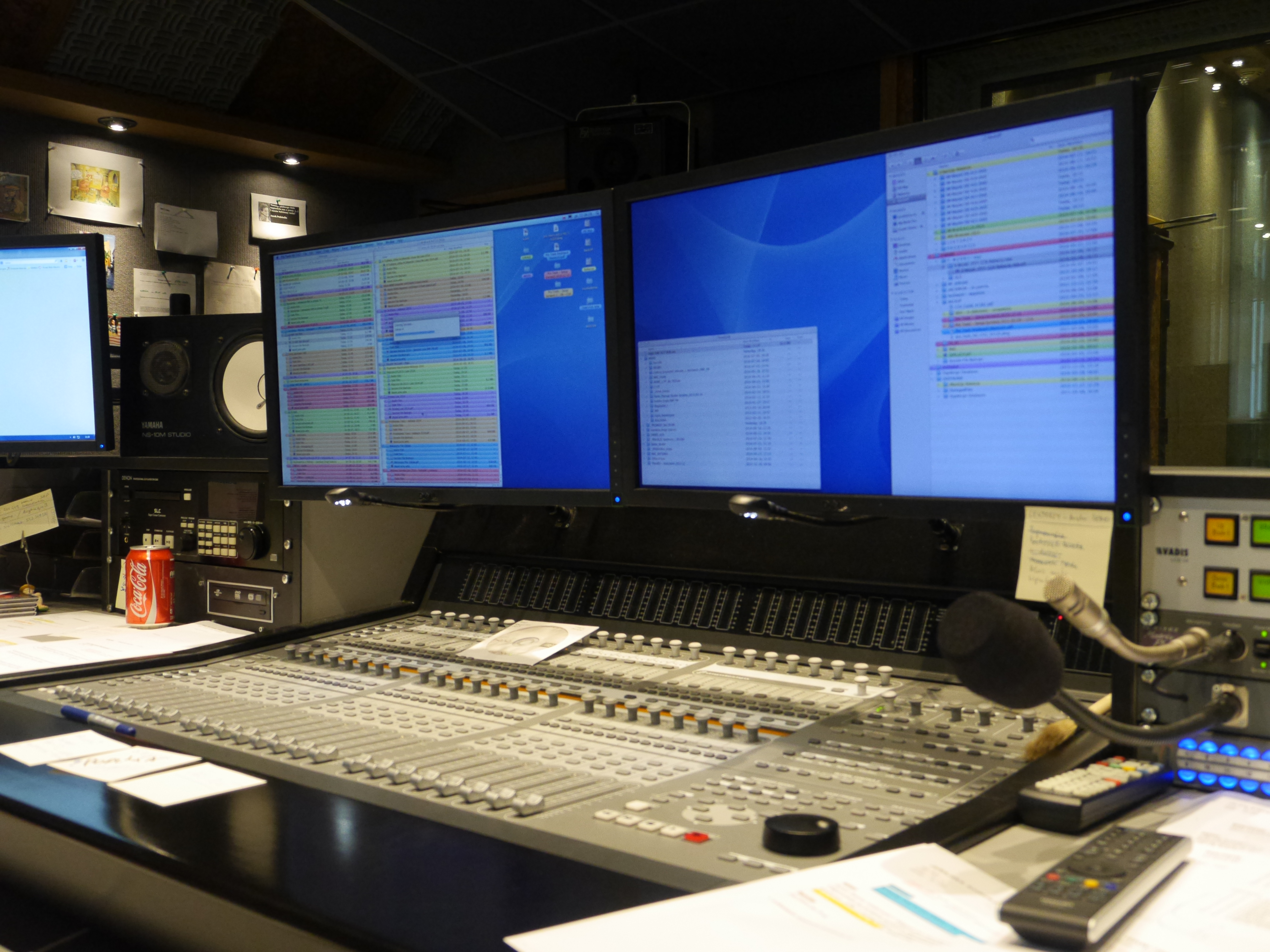 Siedziba radia RMF FM, al. Waszyngtona 1, 30-204 Kraków This photo was taken with Panasonic Lumix DMC-GH3 camera, thanks to Panasonic. You can see all photographs in category: Taken with Panasonic Lumix DMC-GH3.